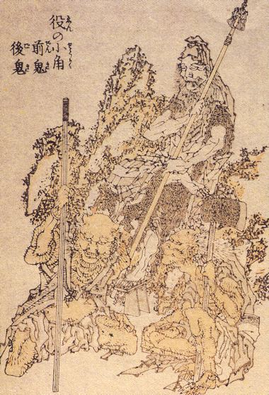 En no Gyōja, Zenki, Goki (役小角, 前鬼, 後鬼) from Hokusai Manga (北斎漫画 十編)